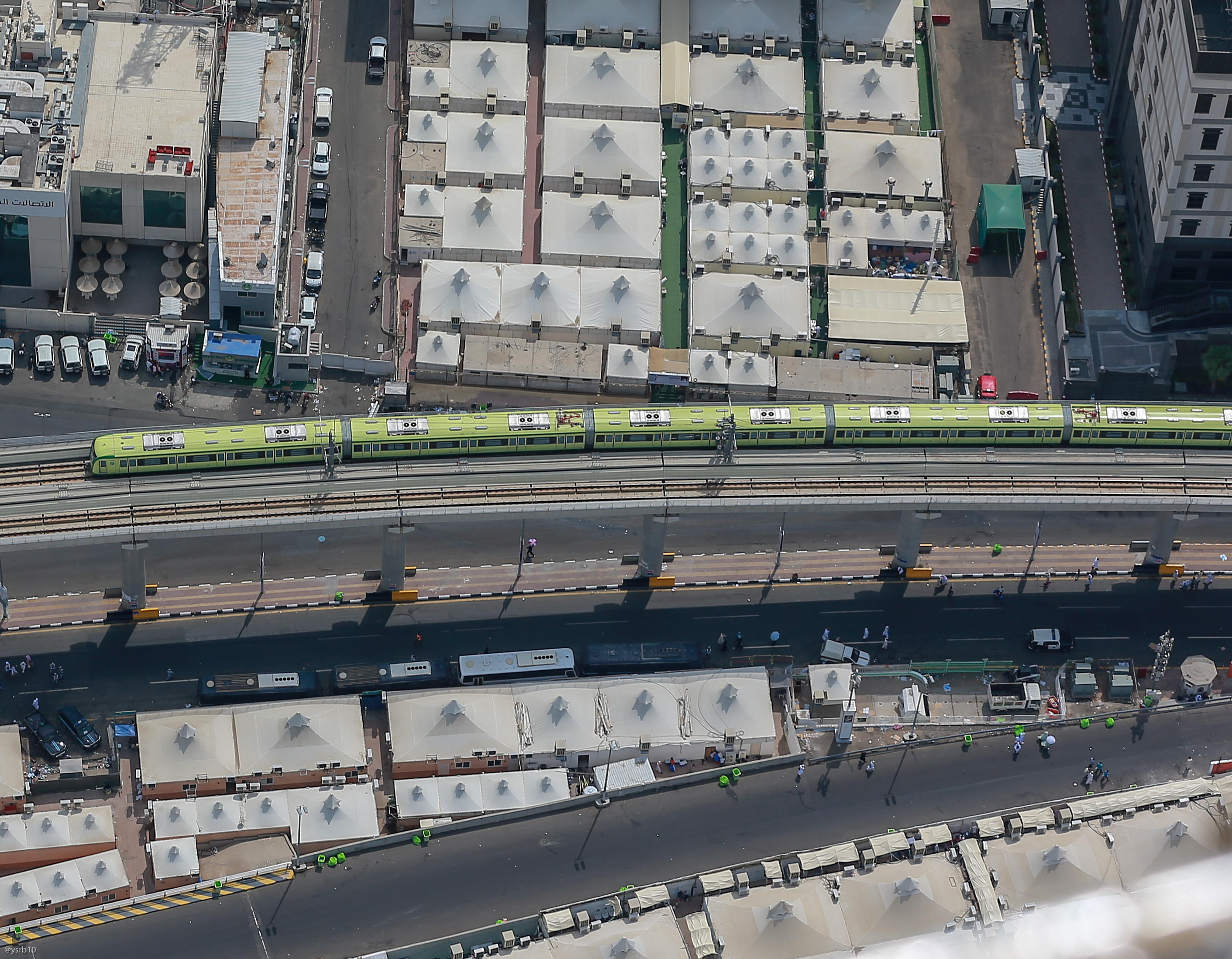 صورة جوية للقطار